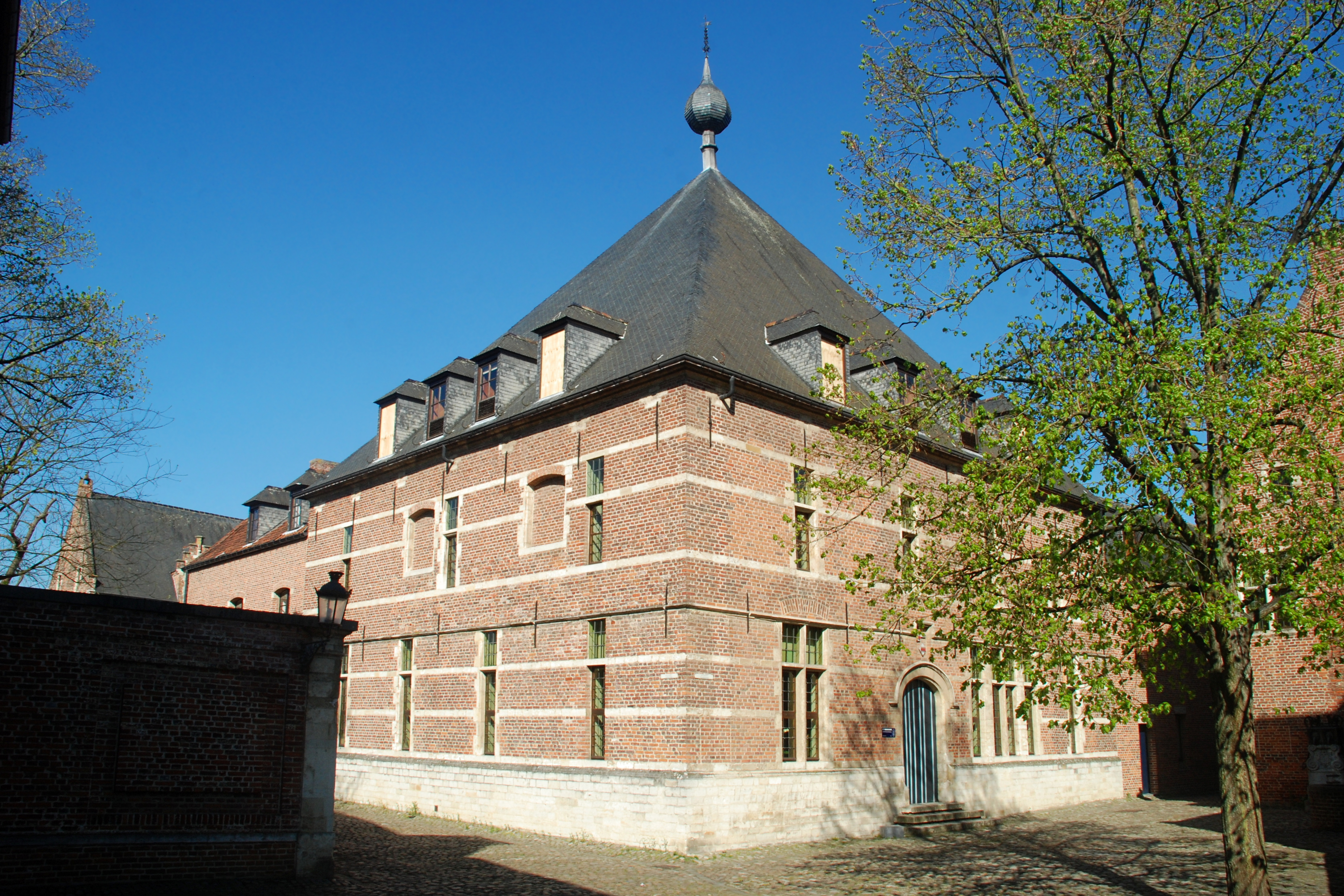 Belgium - Leuven - Groot Begijnhof - Convent van Chièvres - Benedenstraat 39